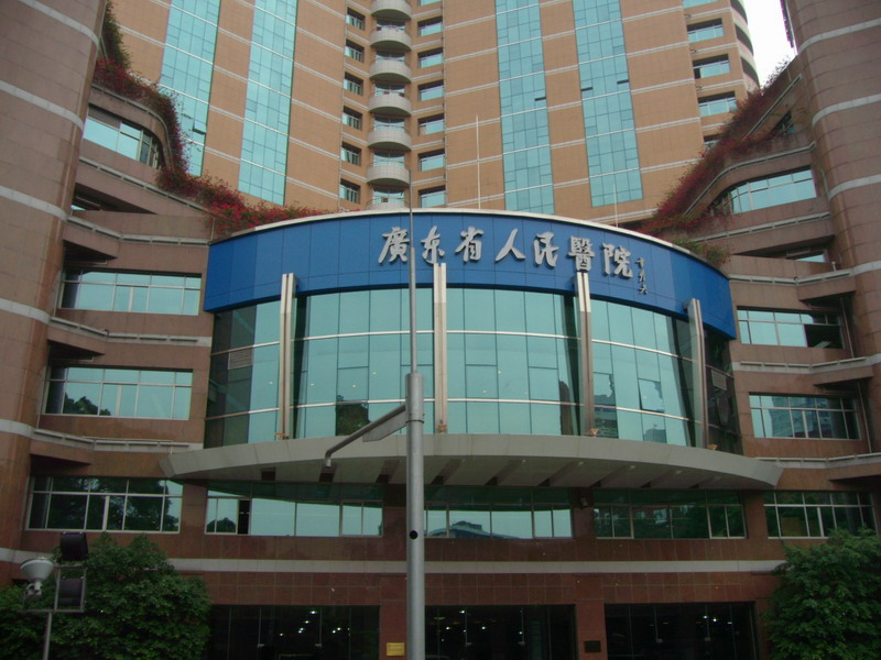 广东省人民医院